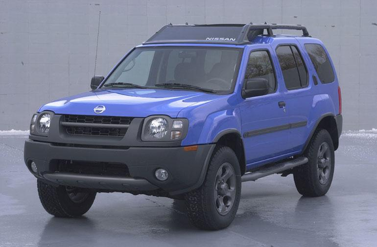 2002 Nissan Xterra in Shock Blue